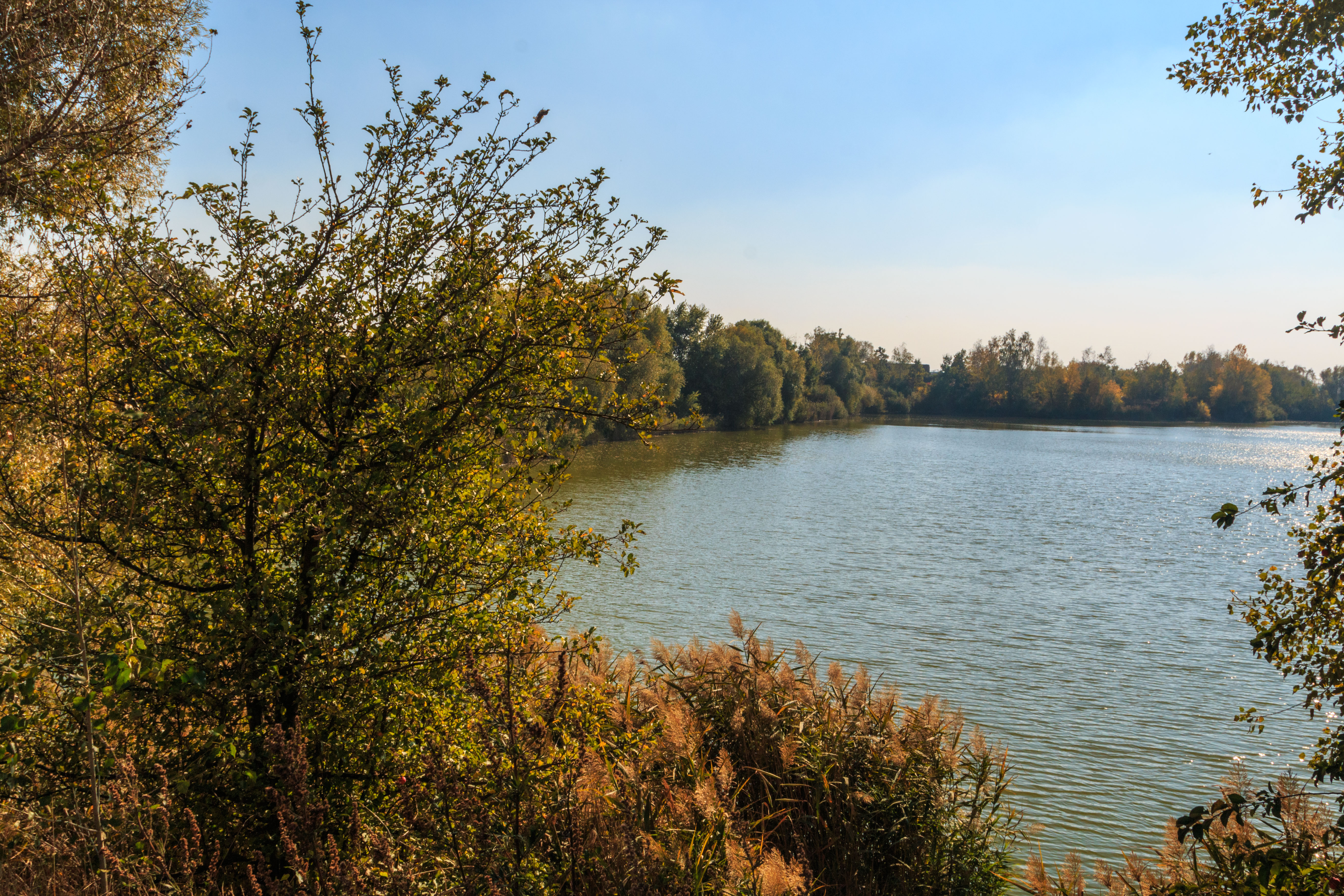 Písník Rusek Project: Vodstvo.